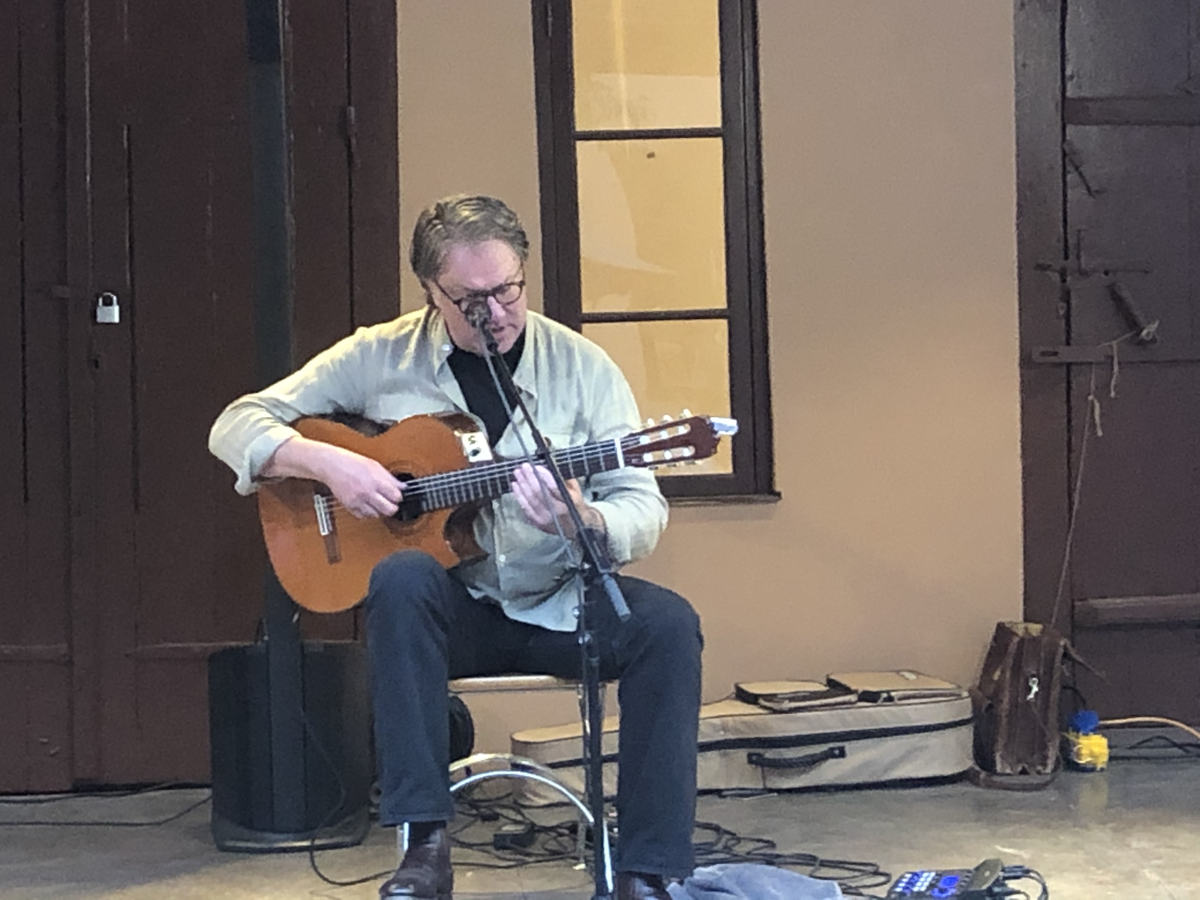 Jan-Olof Andersson sjunger visor i Skövde